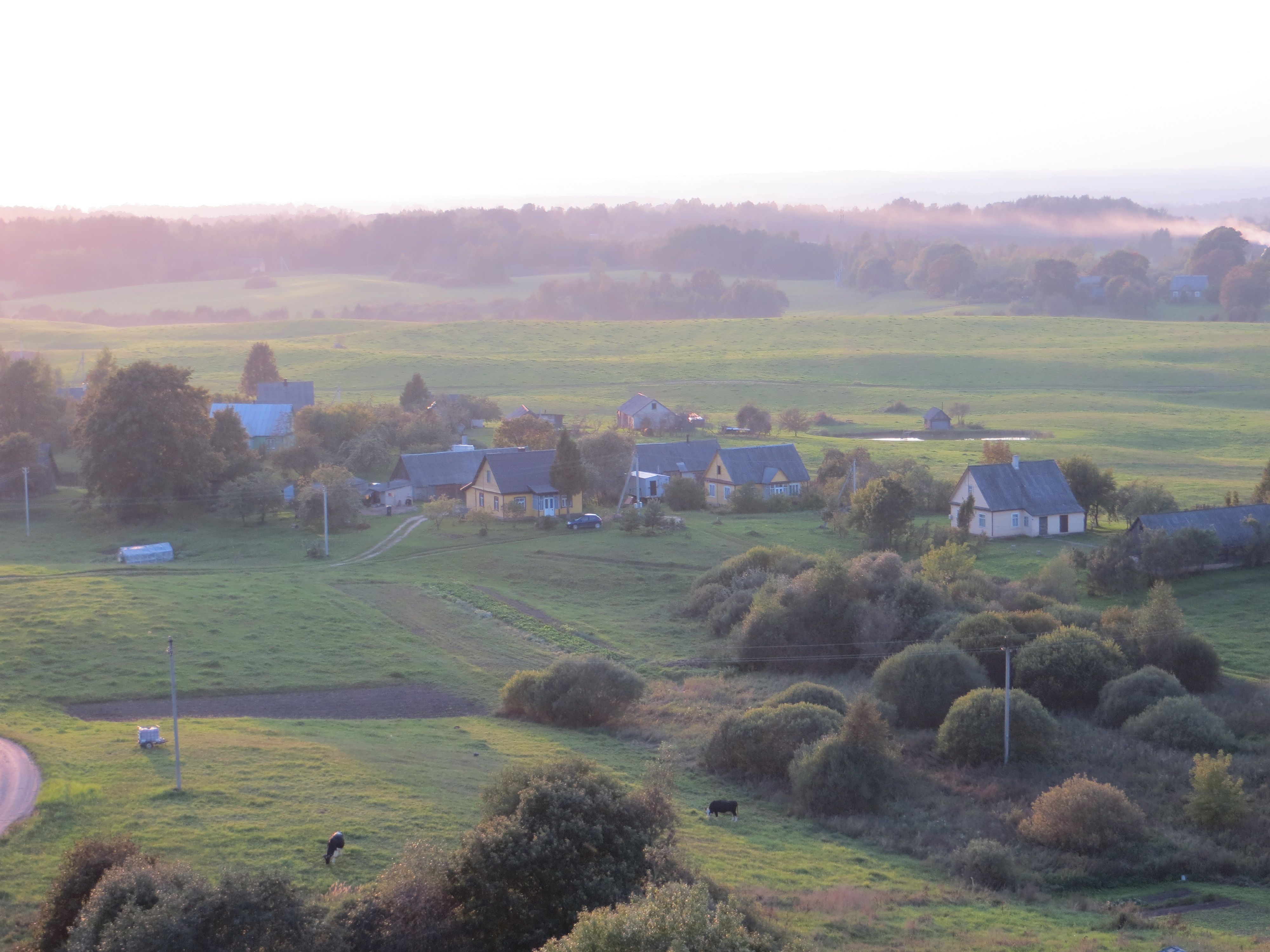 Raudoniškis, Lithuania